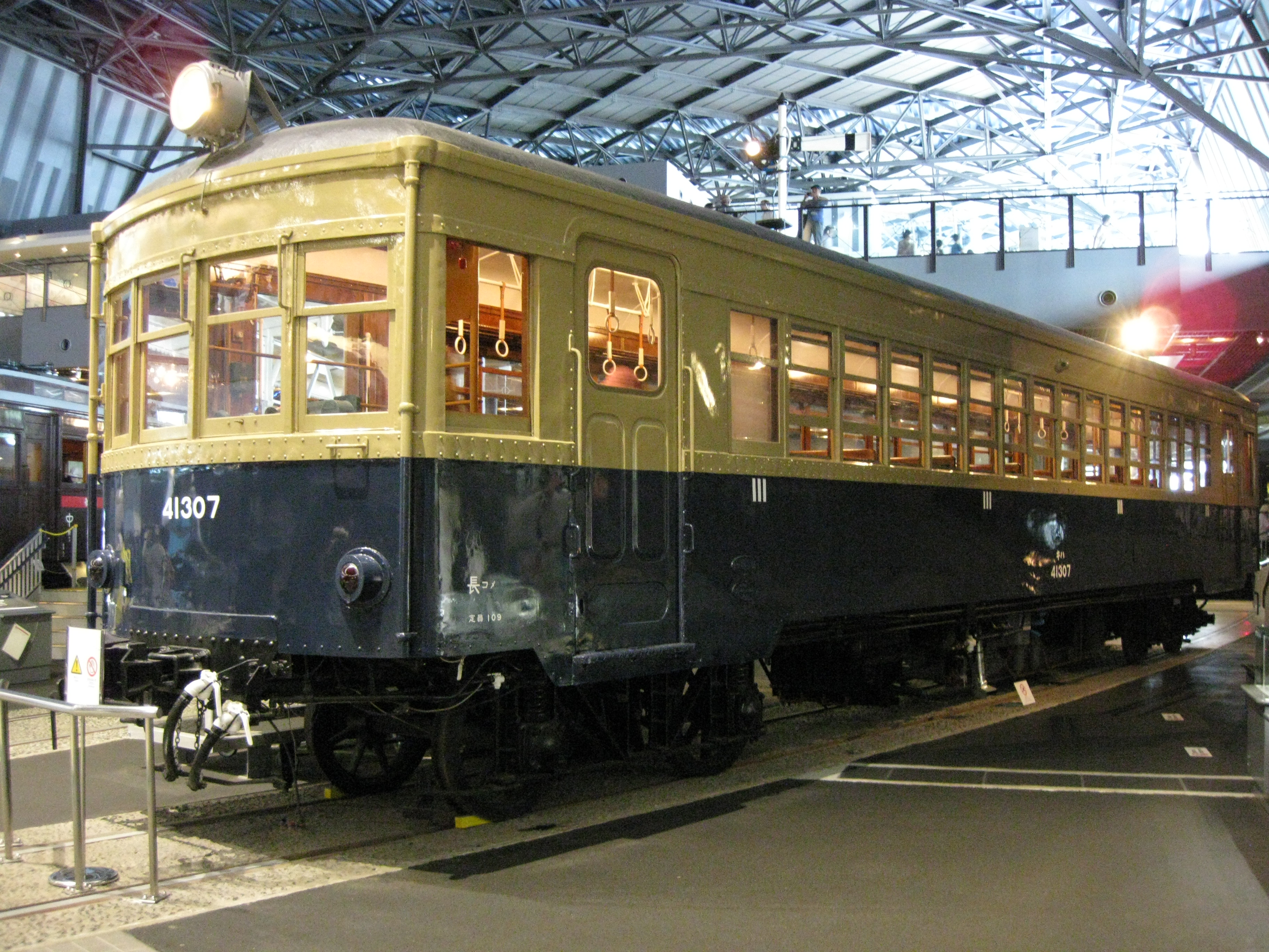 鉄道博物館で展示されているキハ41000（キハ04）